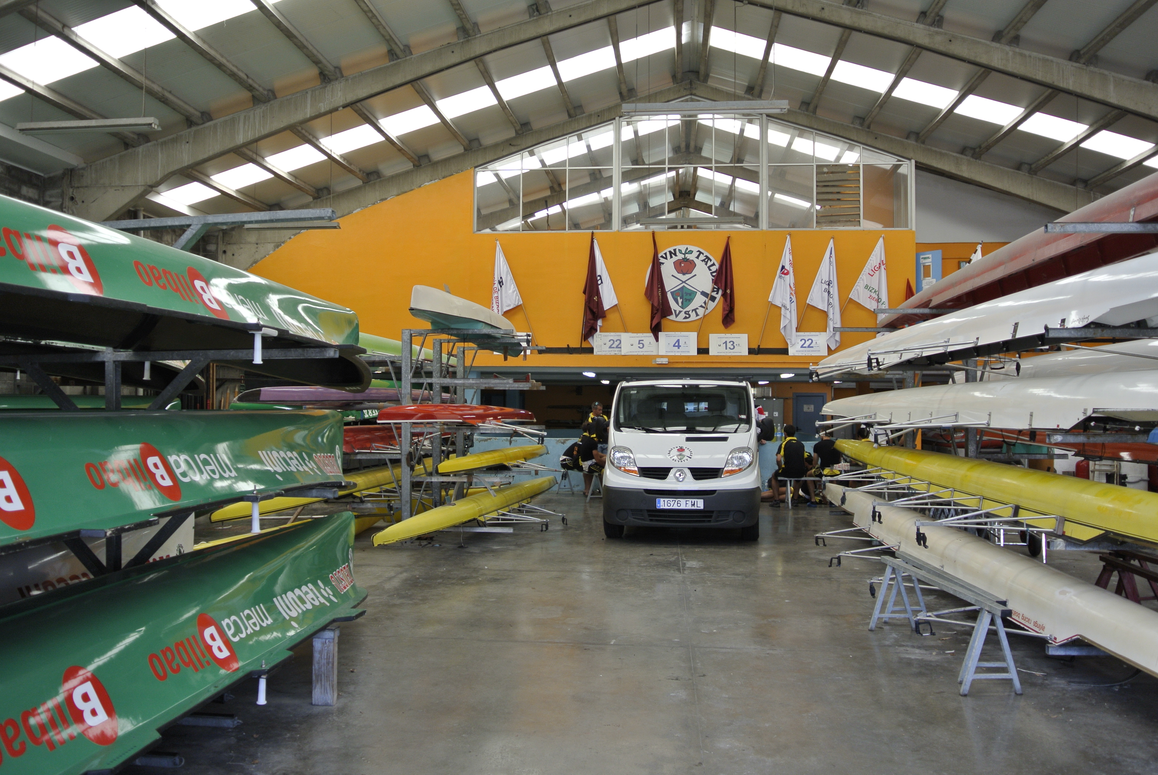 Interior, furgoneta y barcos de Deustu Arraun Taldea